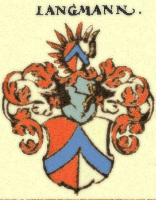 Das Wappen der Langmann